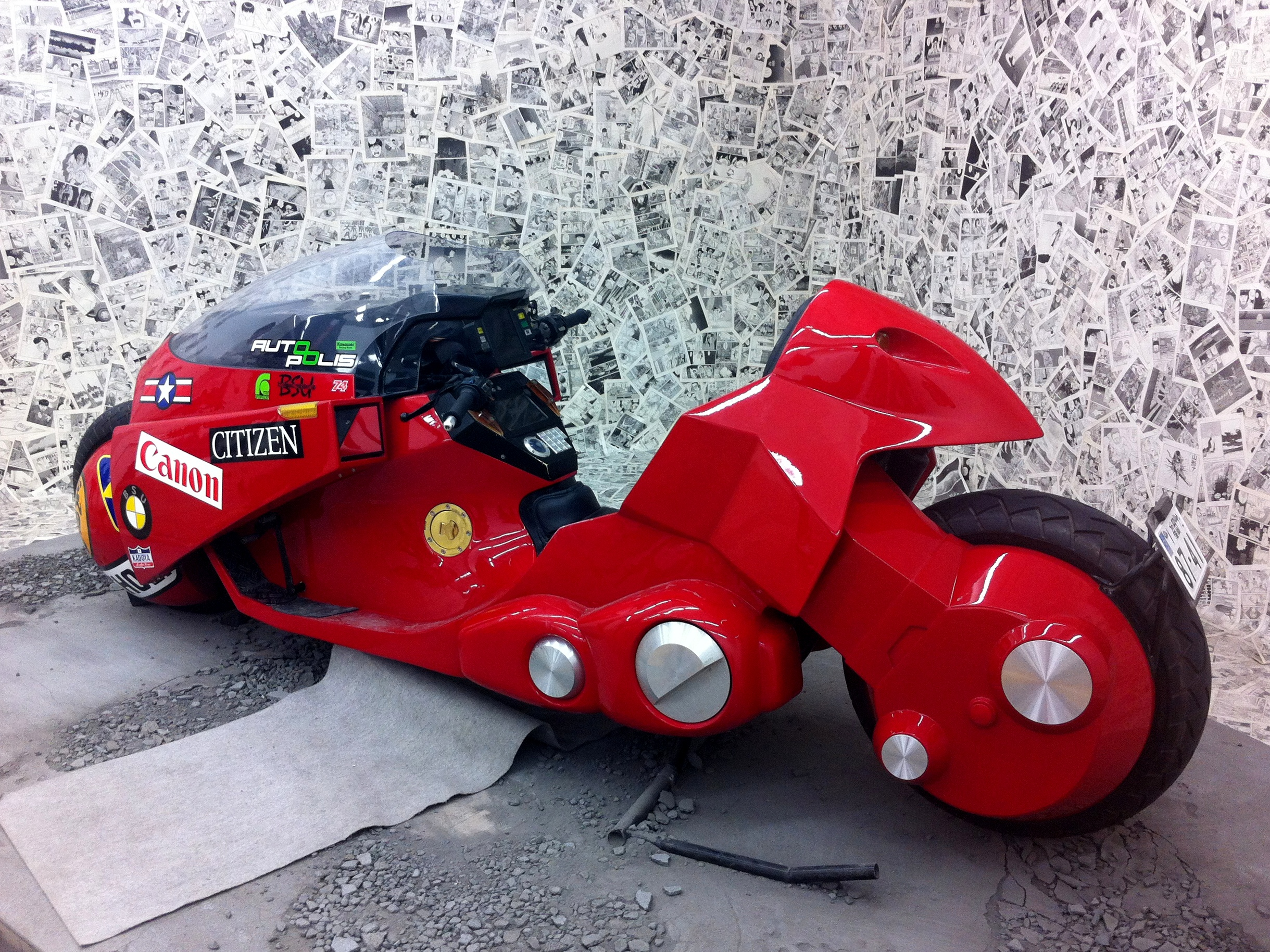 金田のバイク